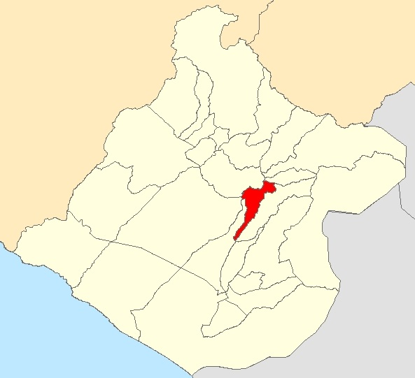 Mapa distrito Estiquepampa, Tacna - Perú